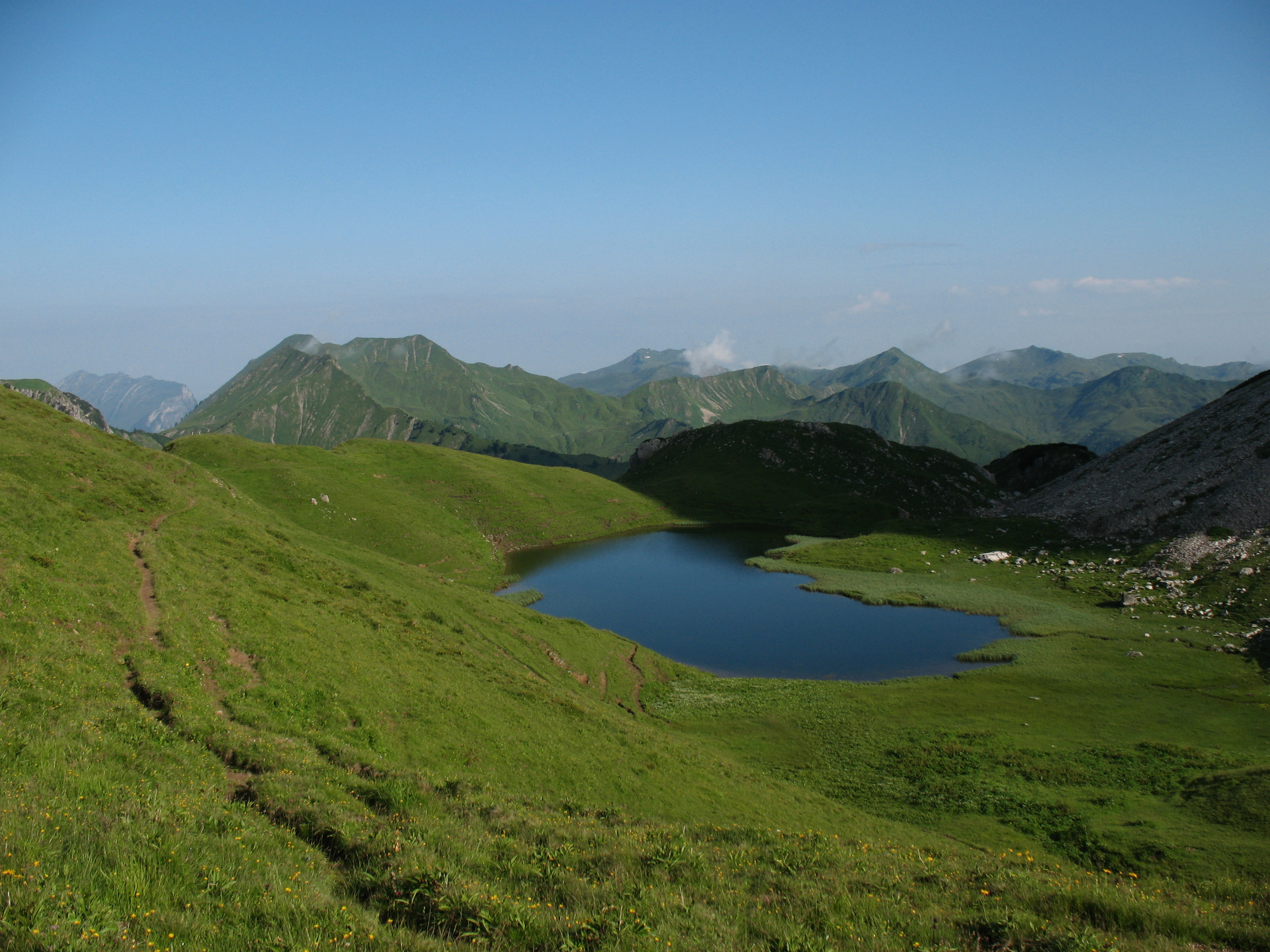 Der Hochalpsee (1970 m) ist ein See in den Allgäuer Alpen westlich unterhalb des Großen Widdersteins.